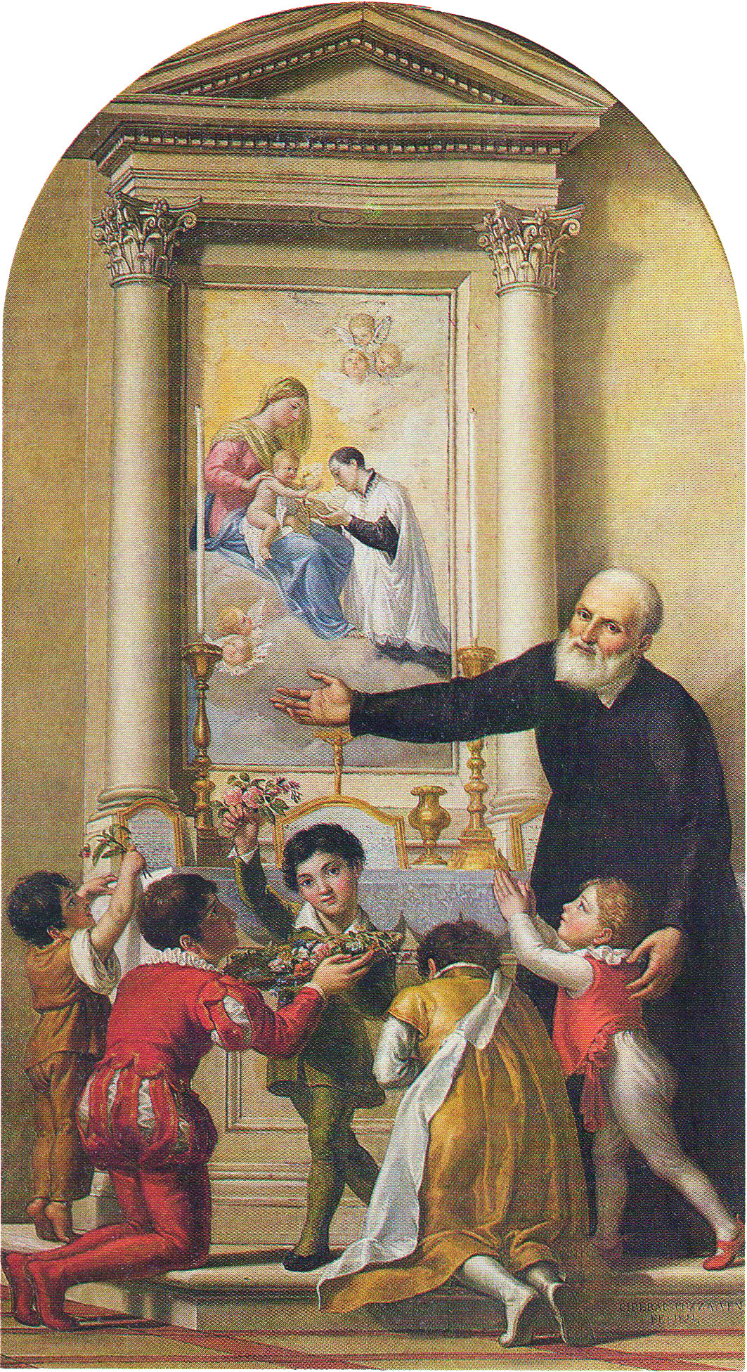 San filippo neri invita i fanciulli a venerare la madonna (liberale cozza)